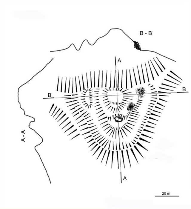 Вишківський замок (схема руїн)